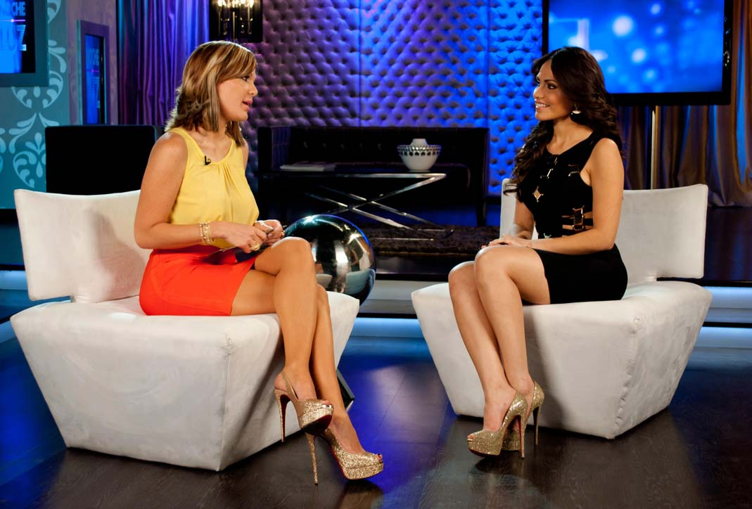 Las presentadoras de televisión dominicanas Luz García y Jenny Blanco.